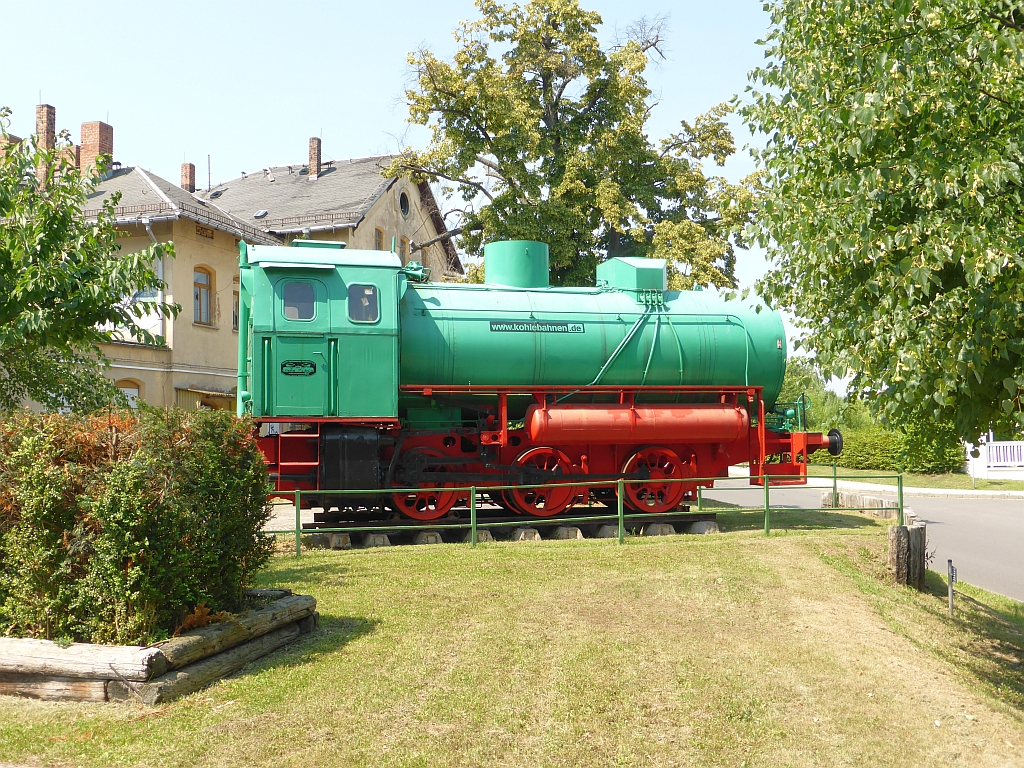 Meuselwitz, Verein Kohlebahnen, 4.7.2015